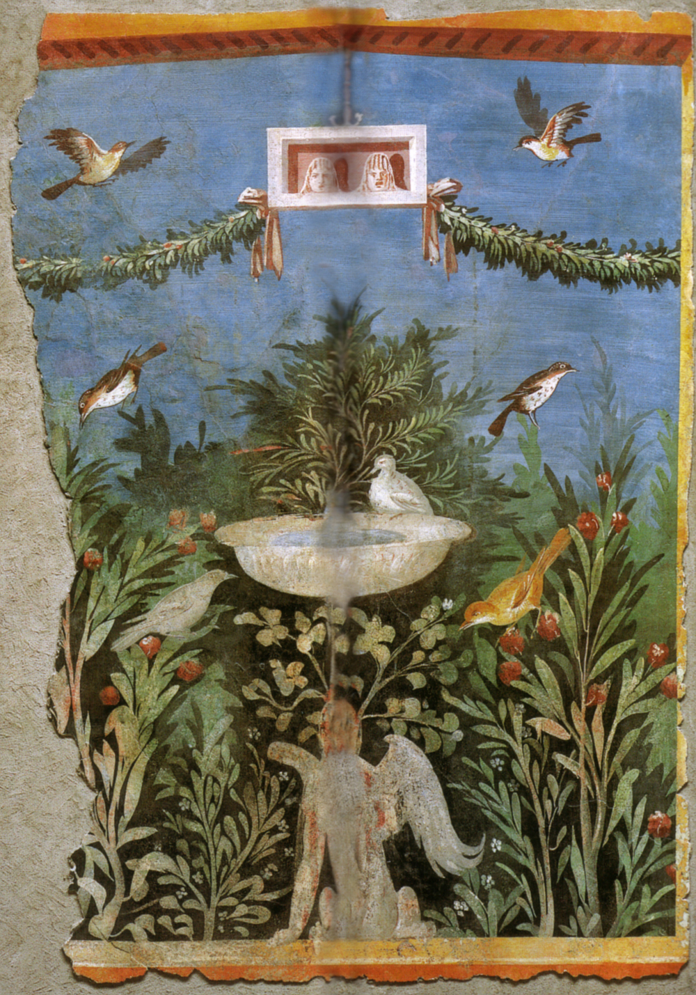 Pannello di pittura parietale da area vesuviana, miho museum, shiga